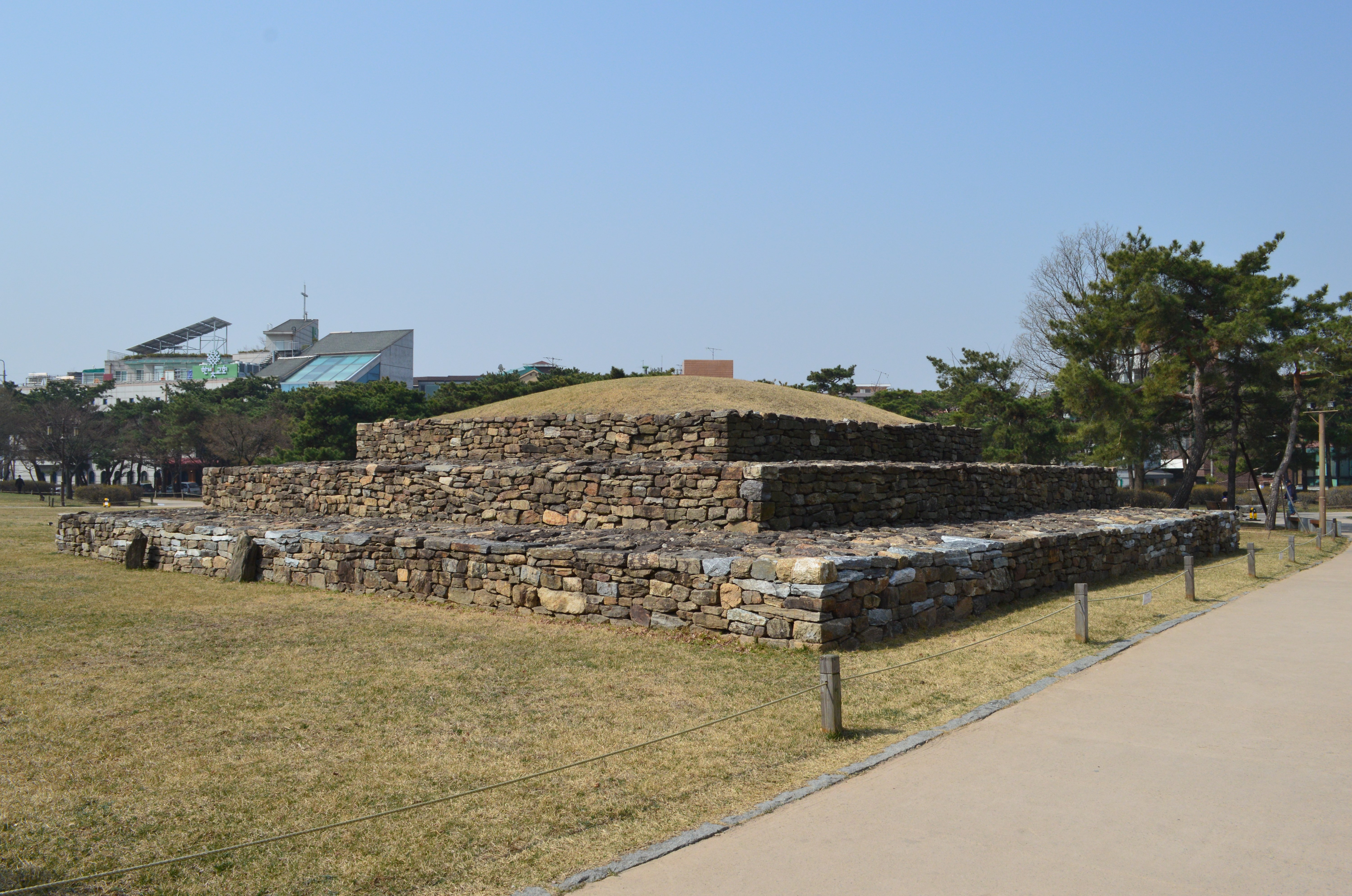 石村洞2号墳